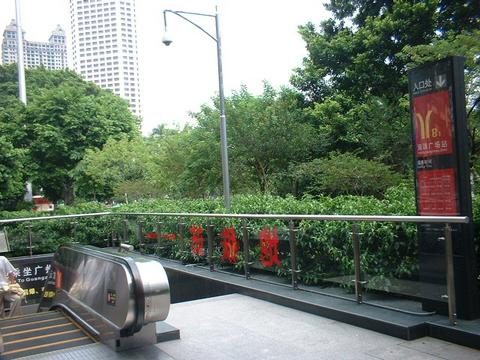 A=广州地铁海珠广场站出入口 B=自己的作品 C=约2005年 D=自己 E=